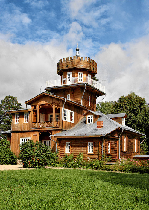 Усадьба художника Ильи Репина This is a photo of Belarusian heritage monument. Reference number: 213Д000281 ( WLM)